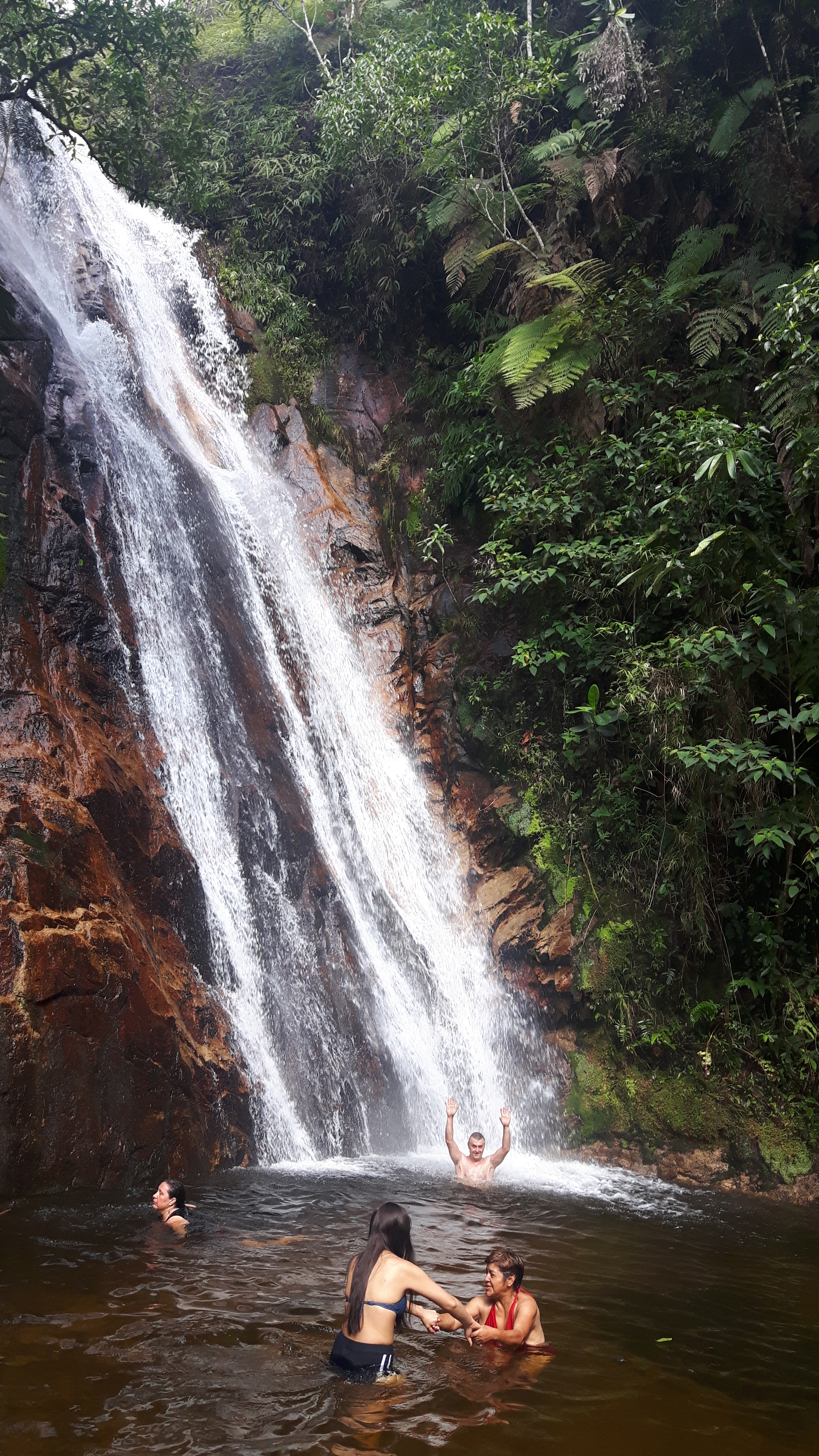 Catarata Jungla Dorada ubicado en el distrito de Coviriali,provincia de Satipo,región Junin,Perú.